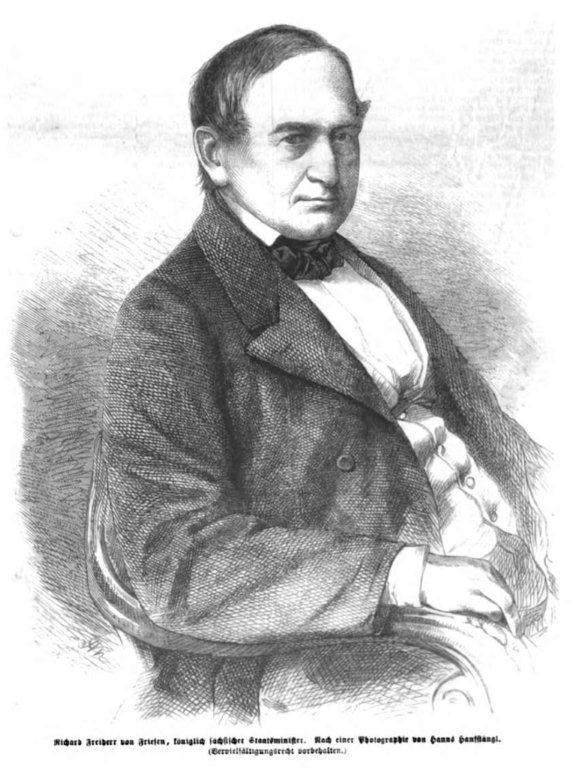 Richard von Friesen, sächsischer Politiker im 19. Jh.